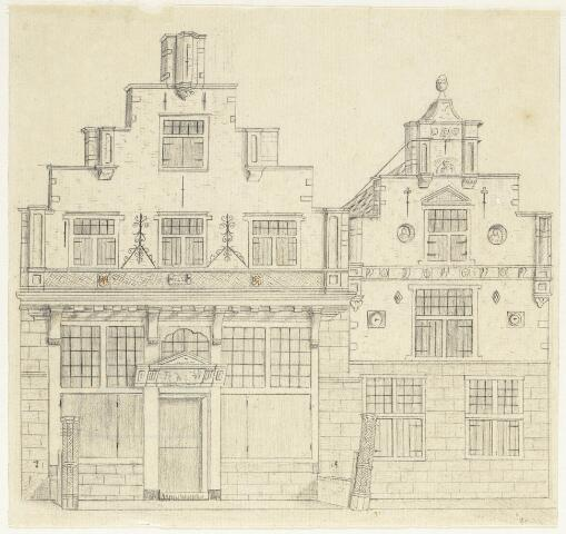 Gevels van het Koning-Willemshuis in Alkmaar